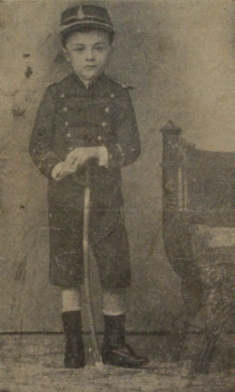 Fotografia do escritor, historiador, museólogo, político, advogado e professor brasileiro, Gustavo Barroso, aos 5 anos de idade (entre 1893 e 1894), em farda militar infantil. Reproduzido na revista integralista "Anauê!" de janeiro de 1936.